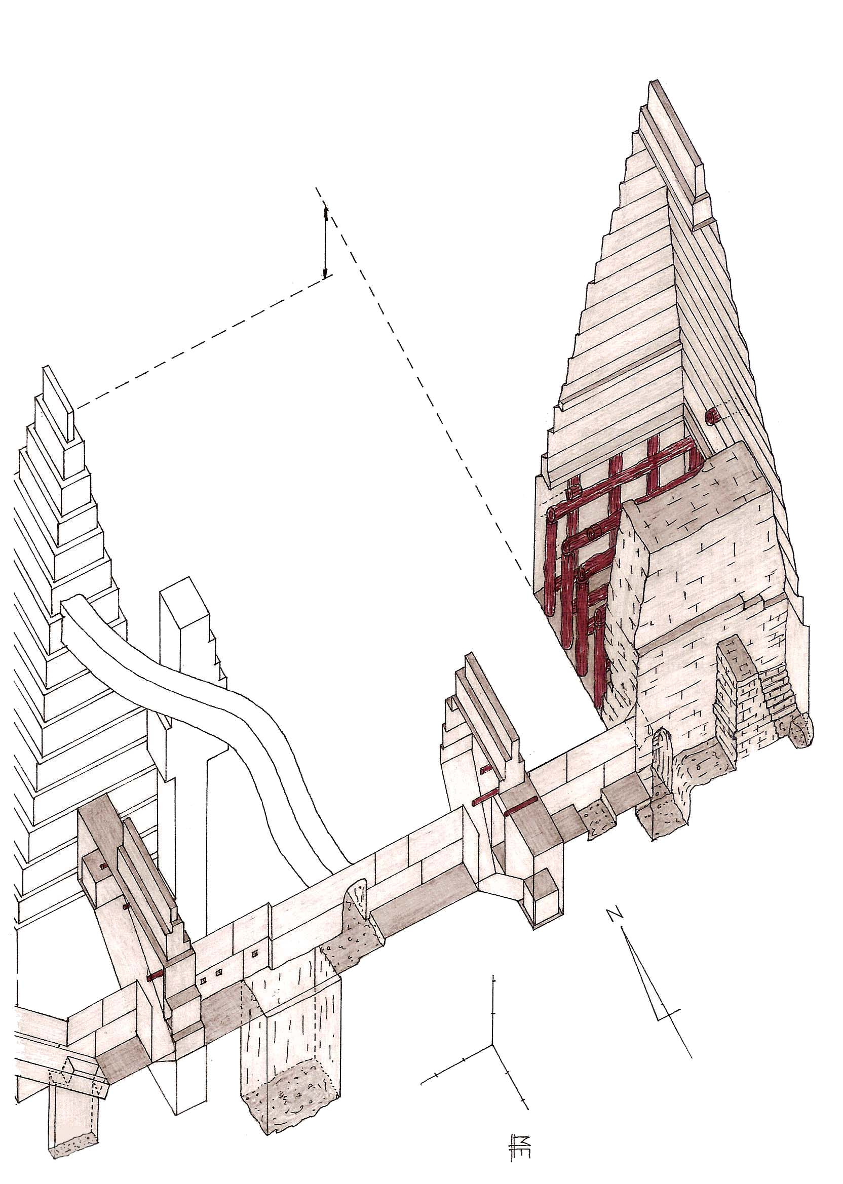 Vue axonométrique des appartements funéraires de la pyramide rhomboïdale de Snéfrou à Dahchour, détails de la chambre supérieure